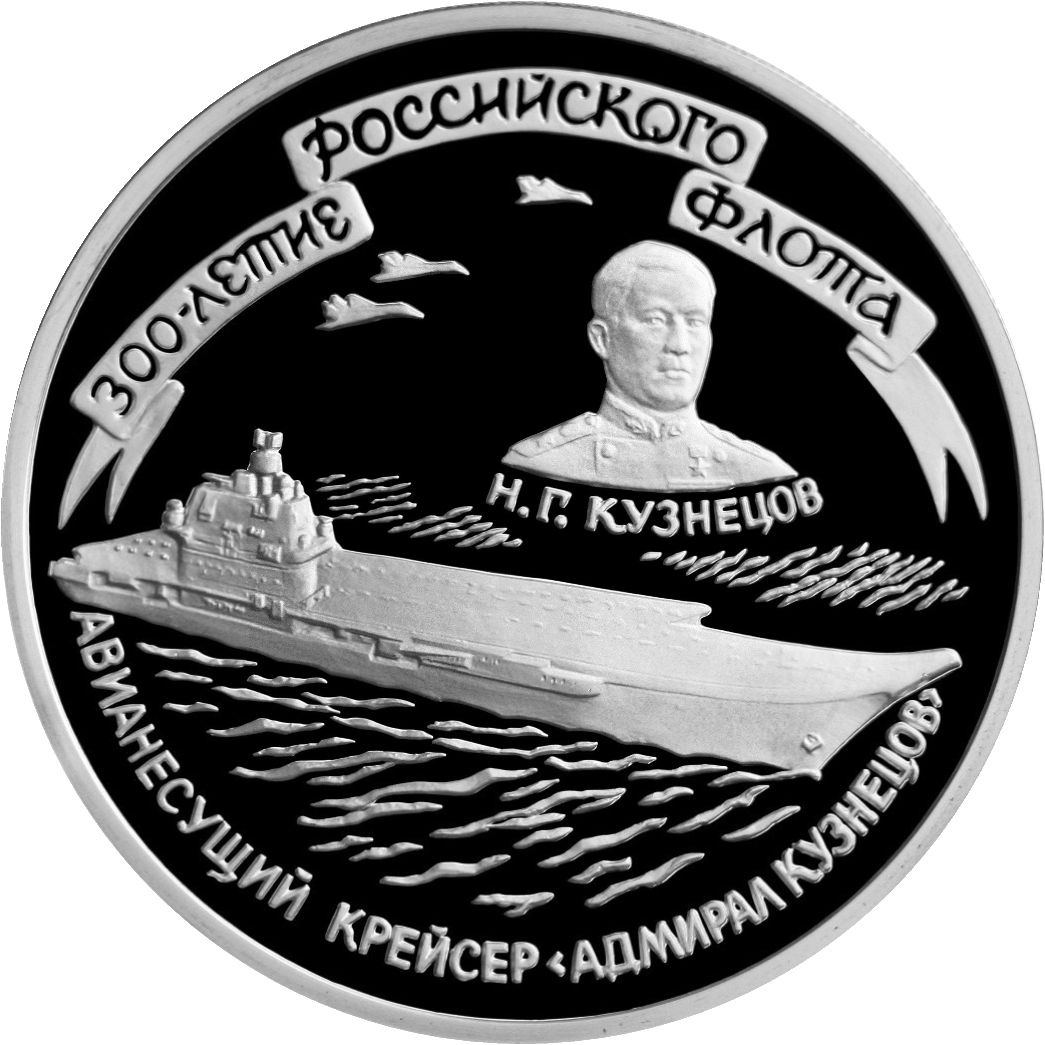 Монета Банка России — Серия: «Флот», 300-летие Российского флота, 3 рубля — Авианосец «Адмирал Кузнецов» названный в честь Николая Герасимовича Кузнецова, реверс